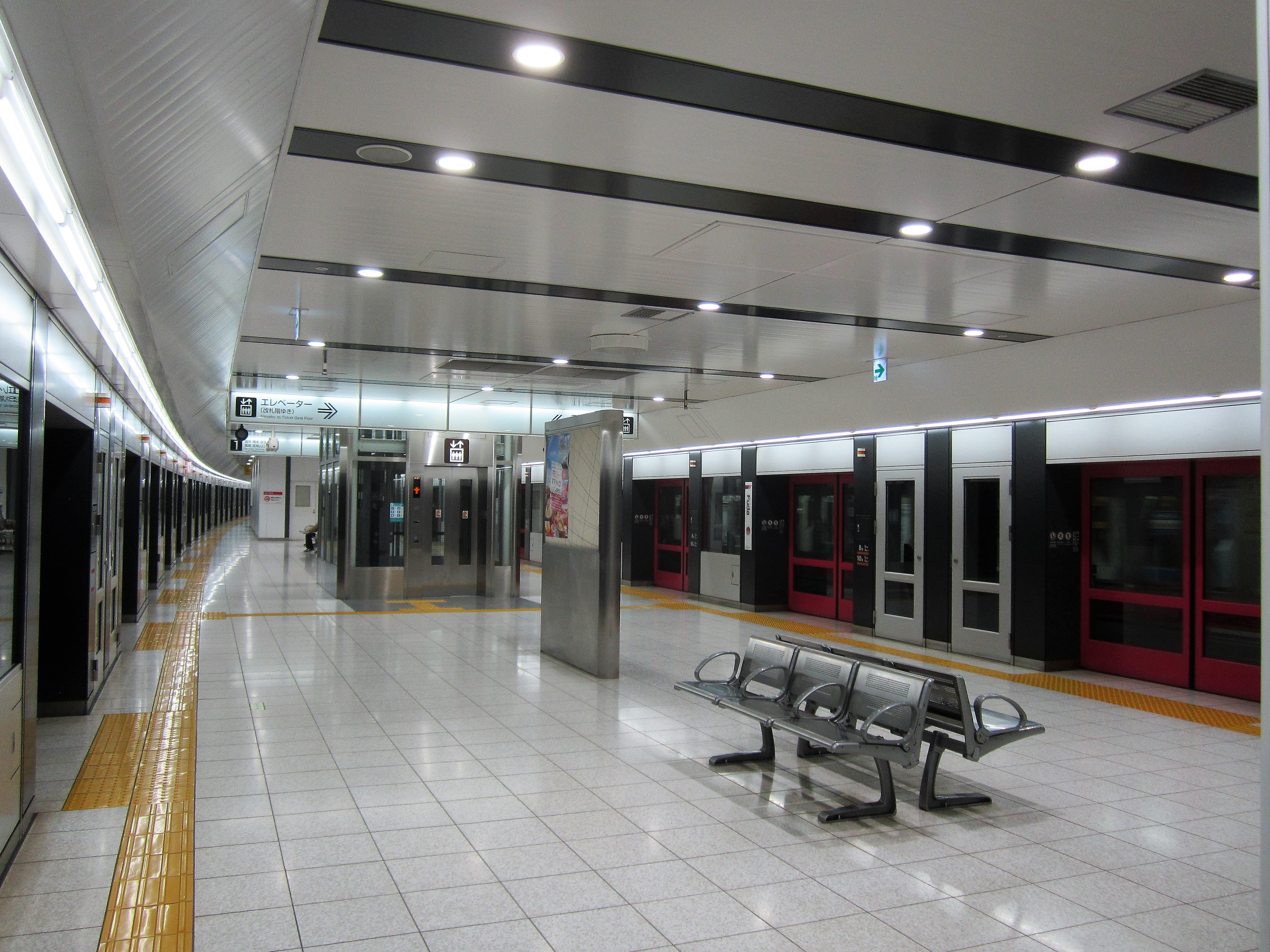 京王線・布田駅ホーム